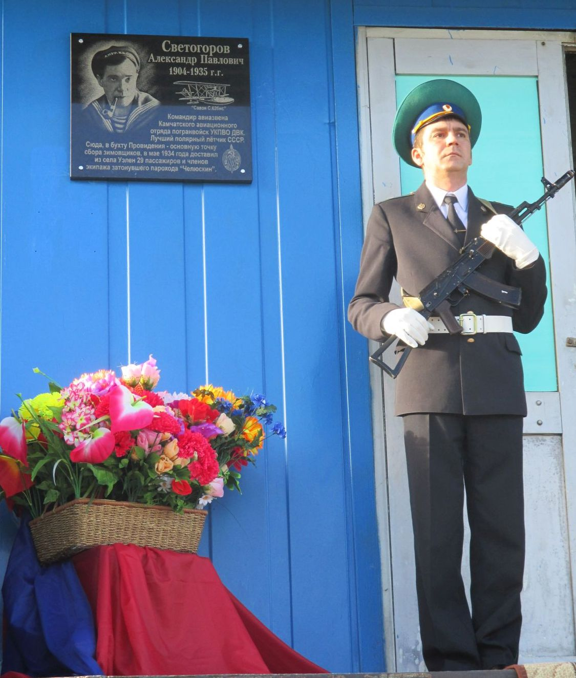 Мемориальная доска А. П. Светогорову на Чукотке, в п. Провидения